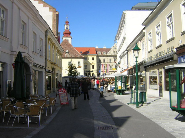 Mödling - Fußgängerzone selbst fotografiert (Patrick Seher) 10/2004 (GNU)